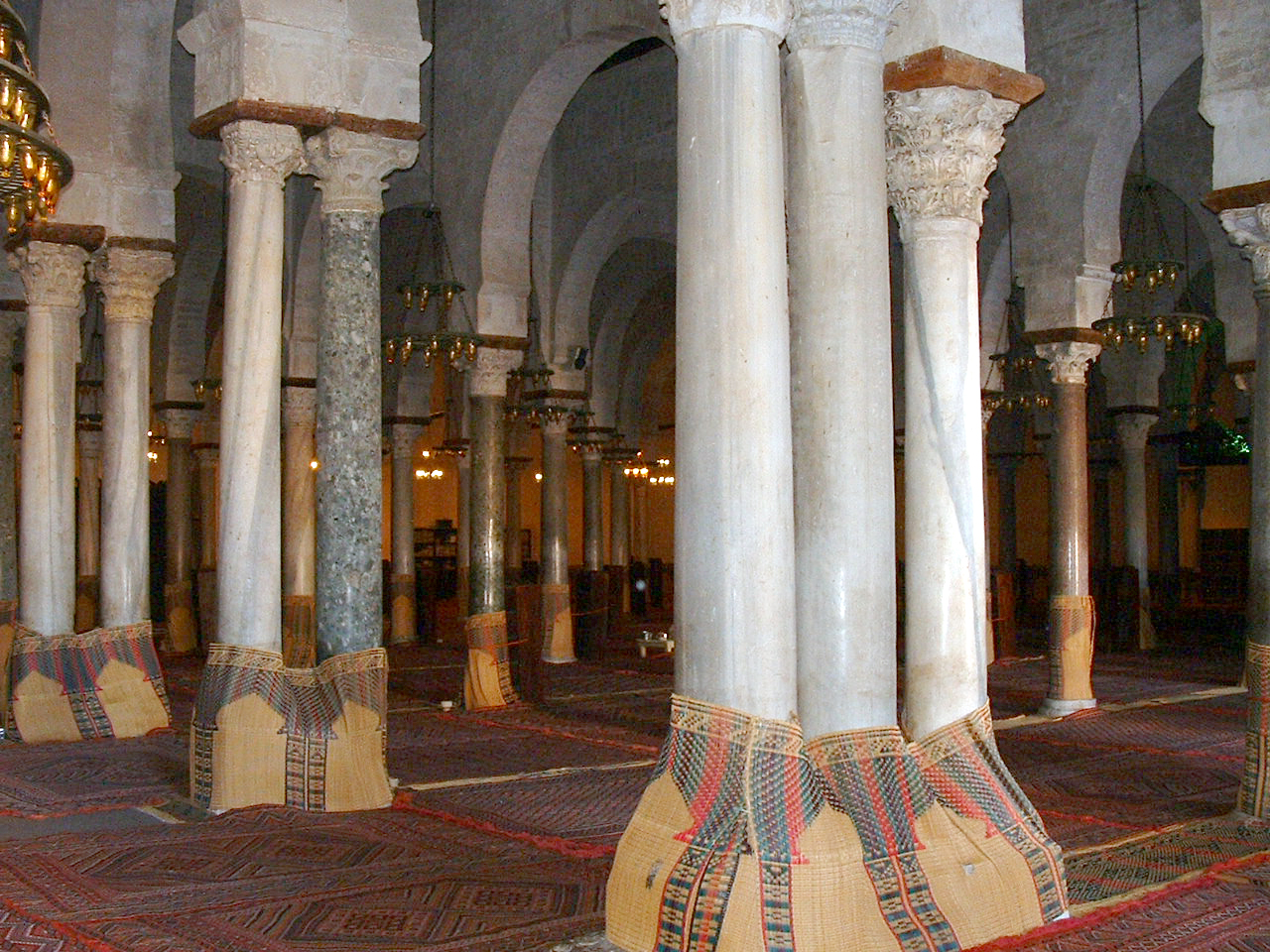 Photographie personnelle (Asram) de l'intérieur de la salle de prières de la mosquée de Kairouan (en Tunisie). Noter la variété des styles des colonnes, provenant sans doute de sites antiques tunisiens, notamment Carthage.